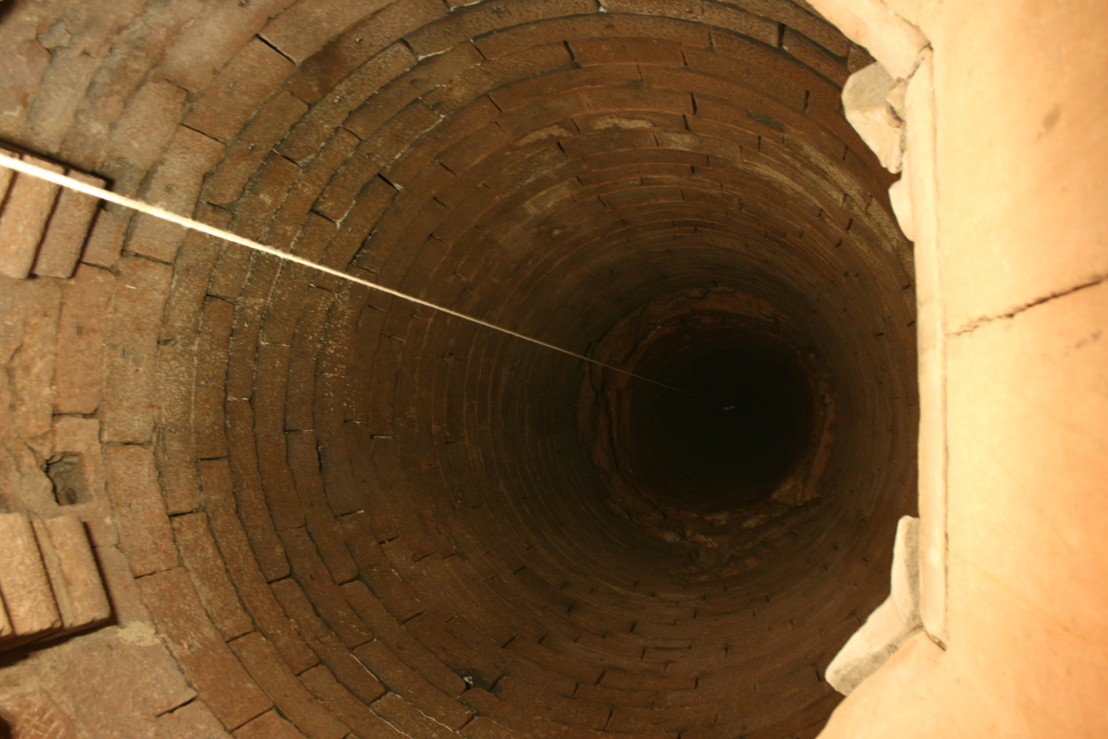 Blick in den Brunnenschacht auf der Burg Breuberg. Links sind die Konsolsteine der achteckigen Brunnenfassung zu erkennen. Der Schacht ist nur im oberen Bereich gemauert, erkennbar auch der Übergang zum Sandsteinfels. (Das herabhängende Seil hält keinen Eimer, sondern ein zusammengerolltes Pergament das im Rahmen einer Schatzsuche für Kinder herabgelassen wurde)